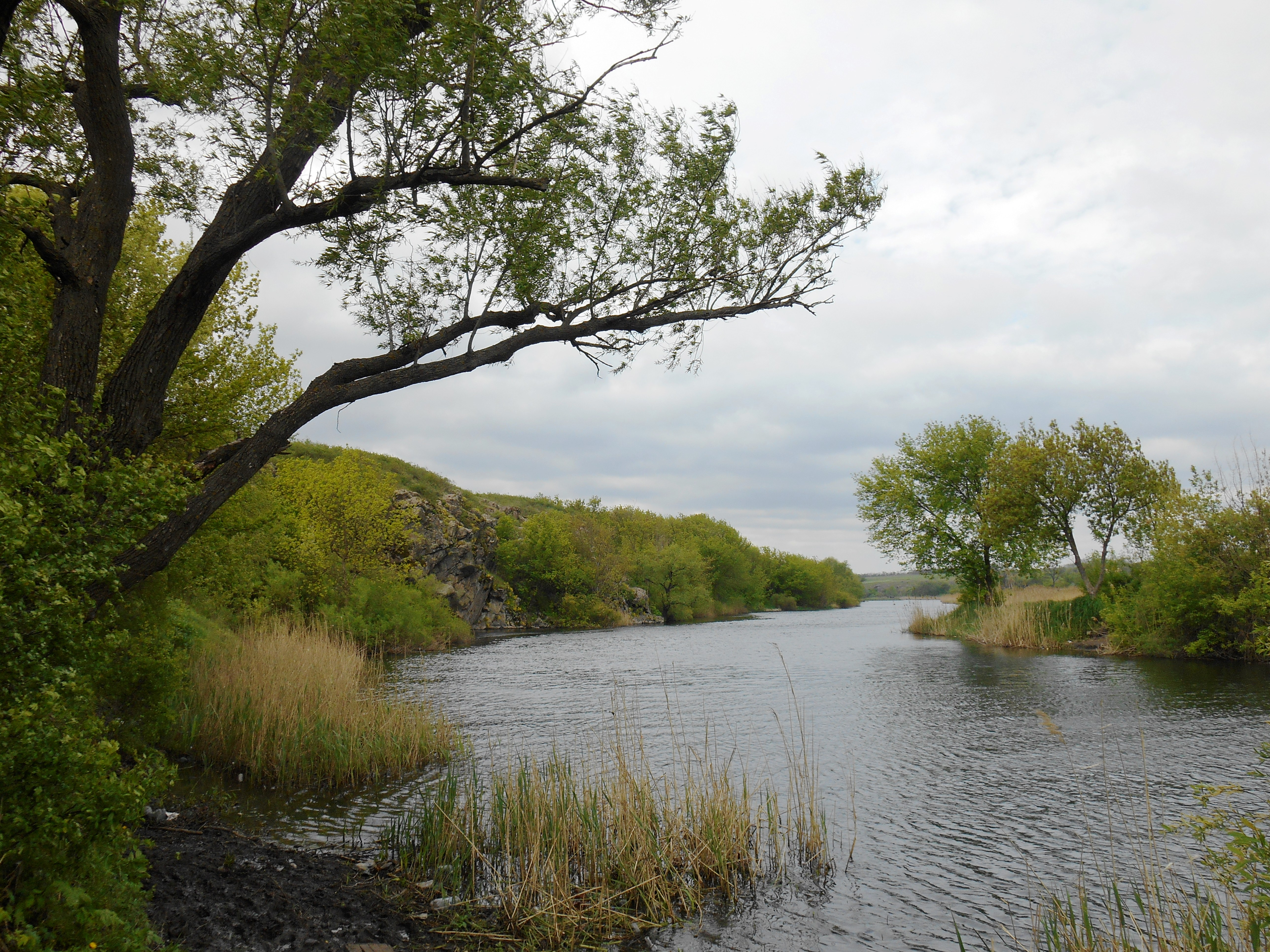 Інгулецький степ, Криворізький р-н, с. Недайвода